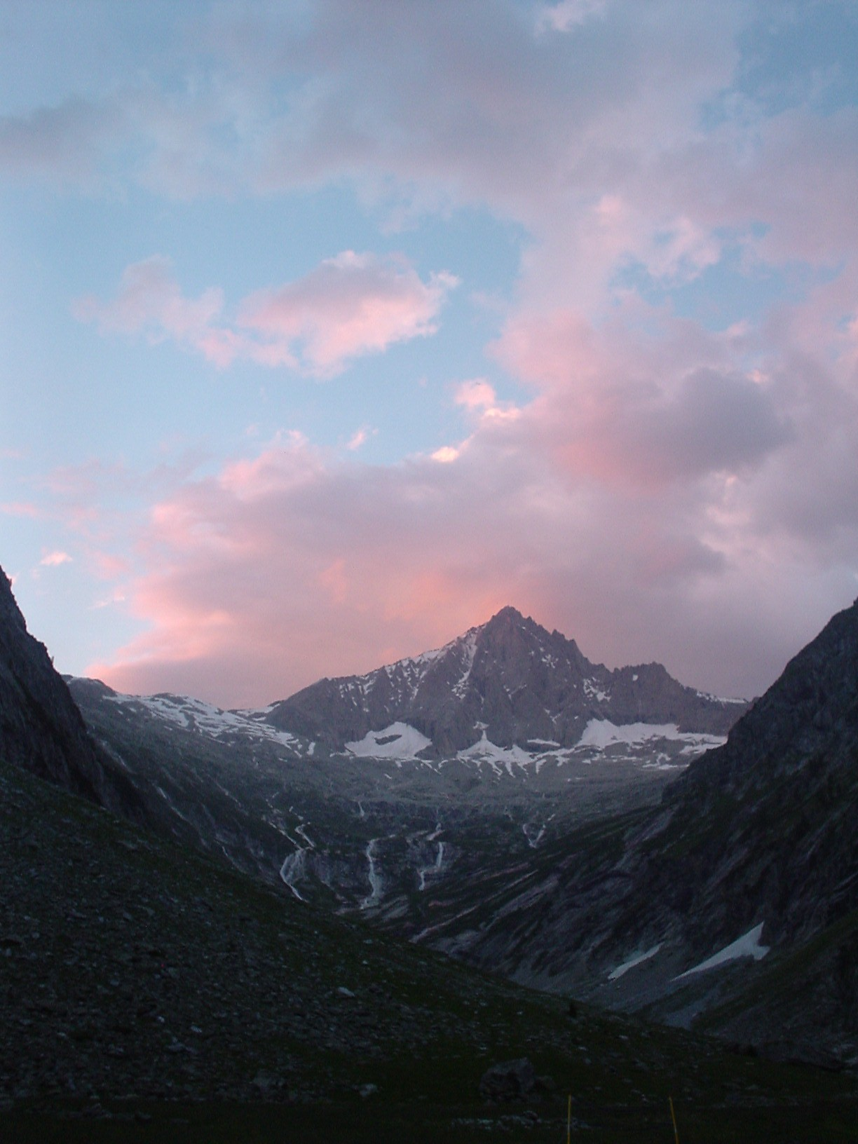 Bietschhorn von den nassen Pletschen aus gesehen.